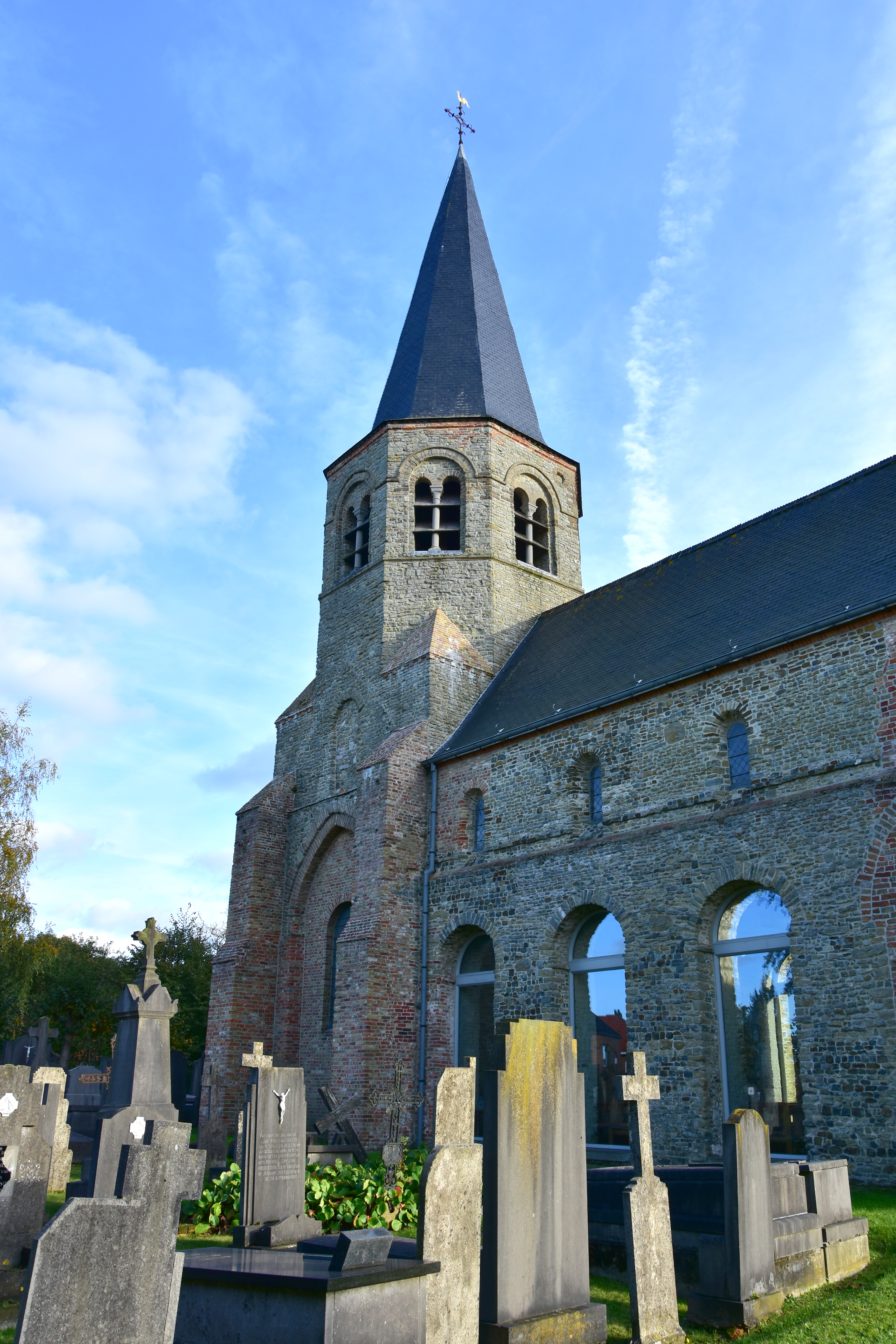 Sint-Eligiuskerk (Snellegem) oudste gedeelte 88778 - 27-10-2019 This photo of immovable heritage has been taken in the Flemish Region